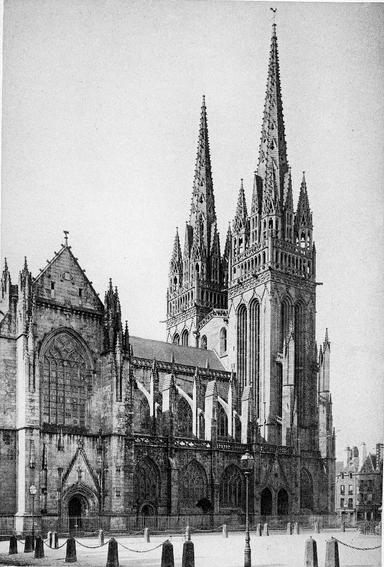 Photo prise par J. Villard - photographe et éditeur